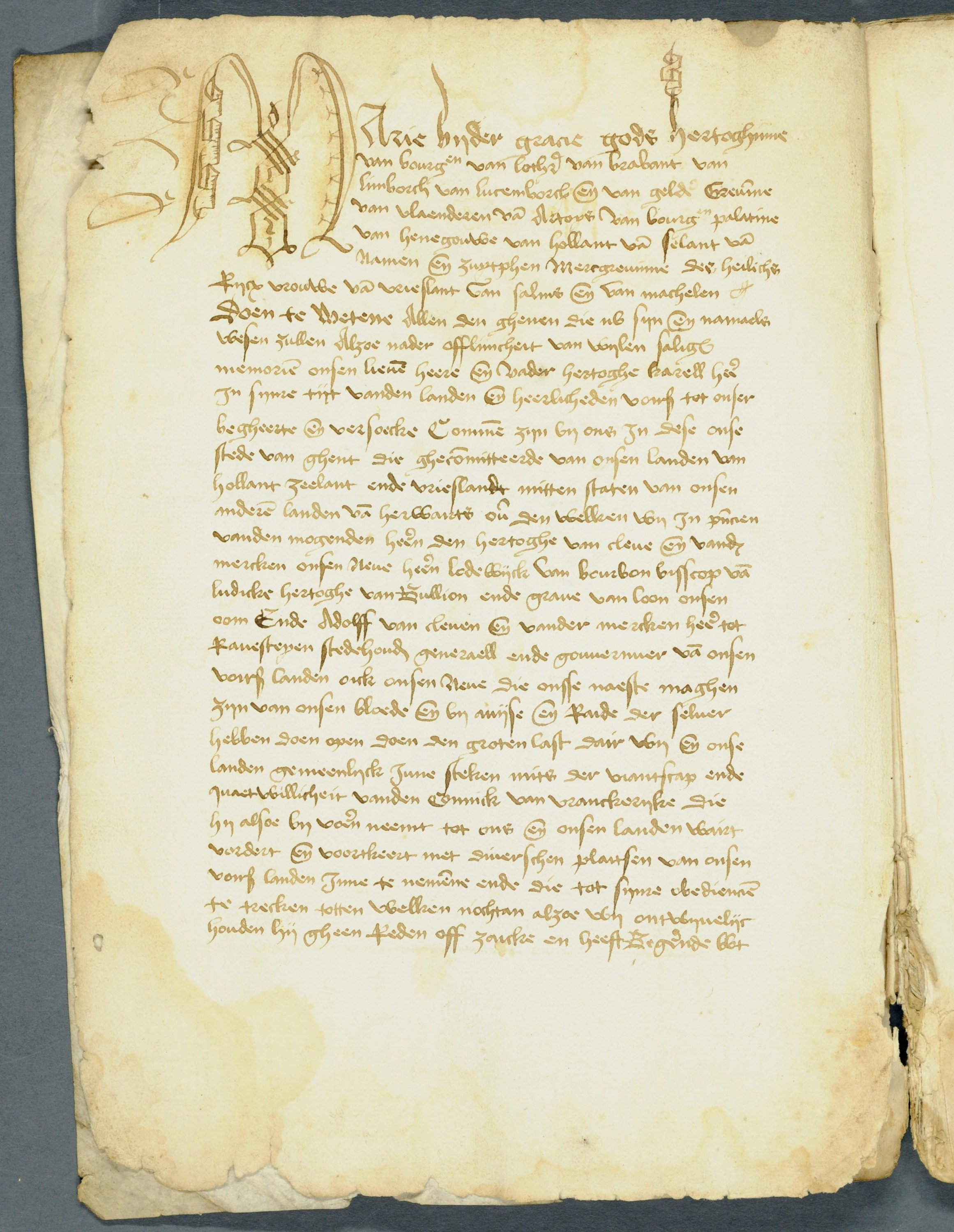 Afschrift van het Groot Privilege (Copyright PD because copyright is not in the page but in the API, go to item , memorix:MEMORIX, field name="auteursrechten_auteursrechthebbende, value = Nationaal Archief, Public Domain)